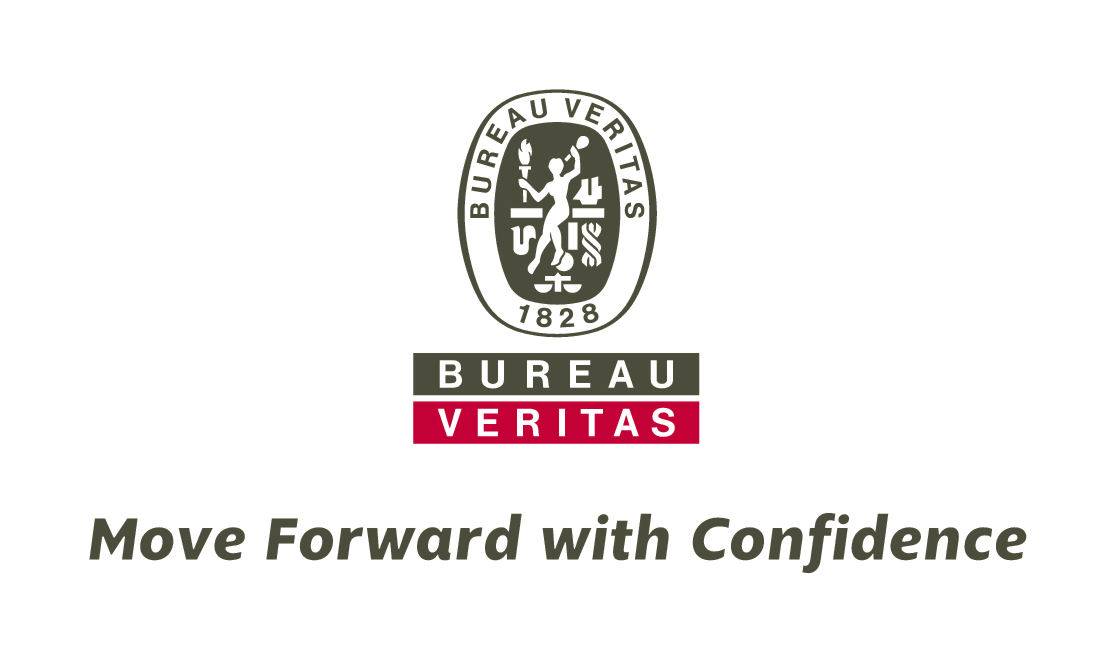 Բյուրո Վերիտաս ընկերության լոգո